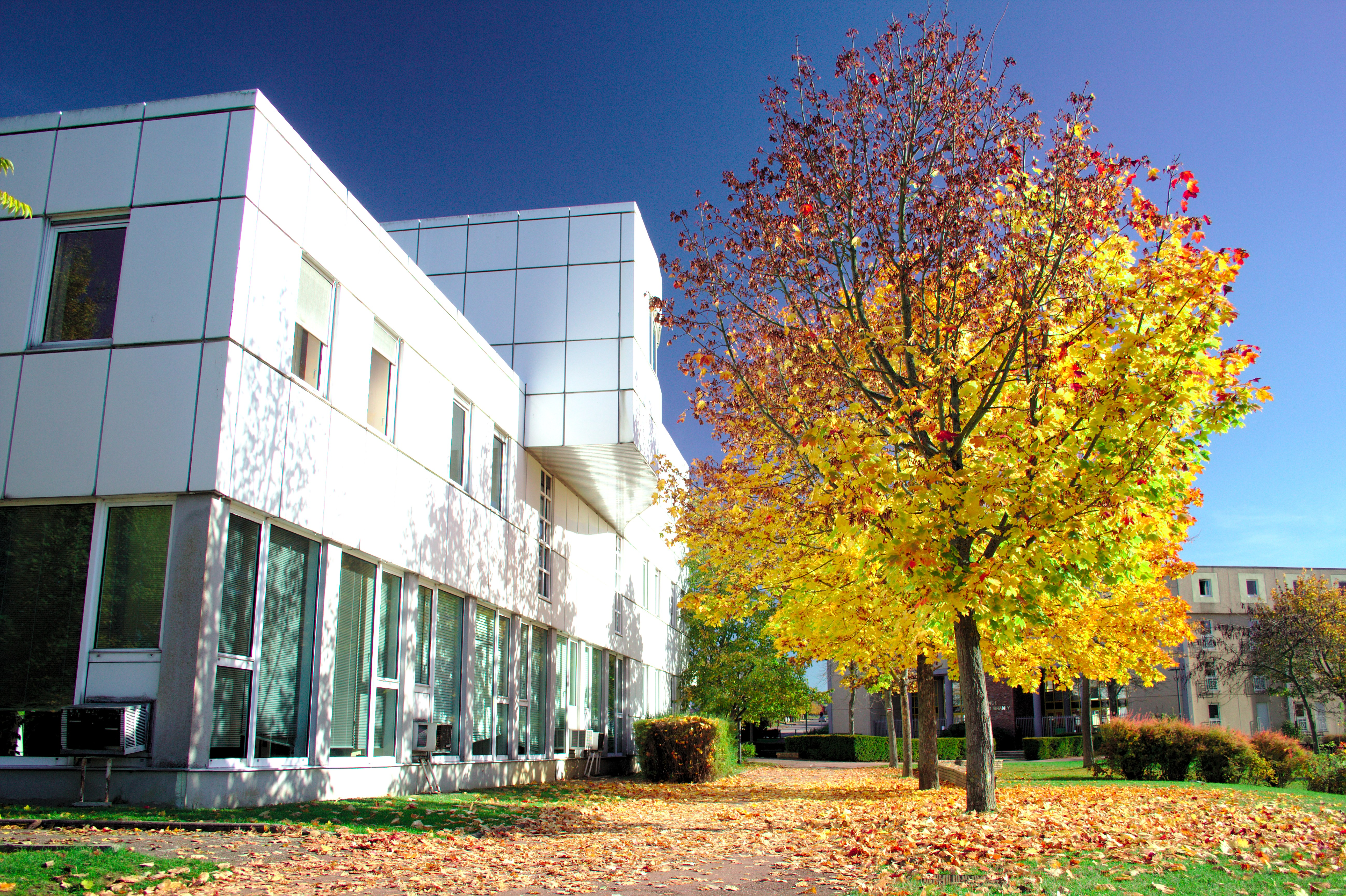 ICN Business School sur le Technopôle de Metz